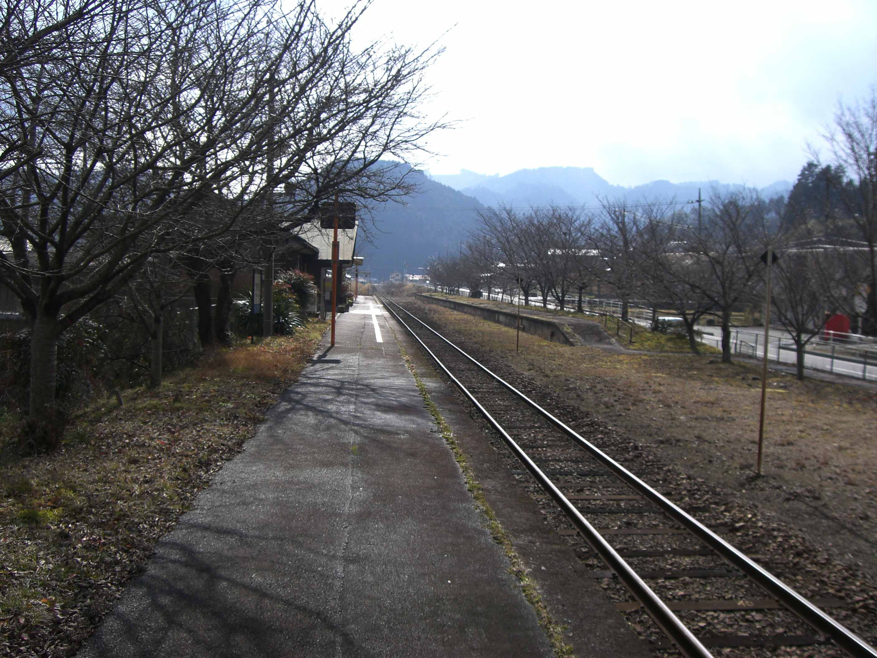 月田駅の構内